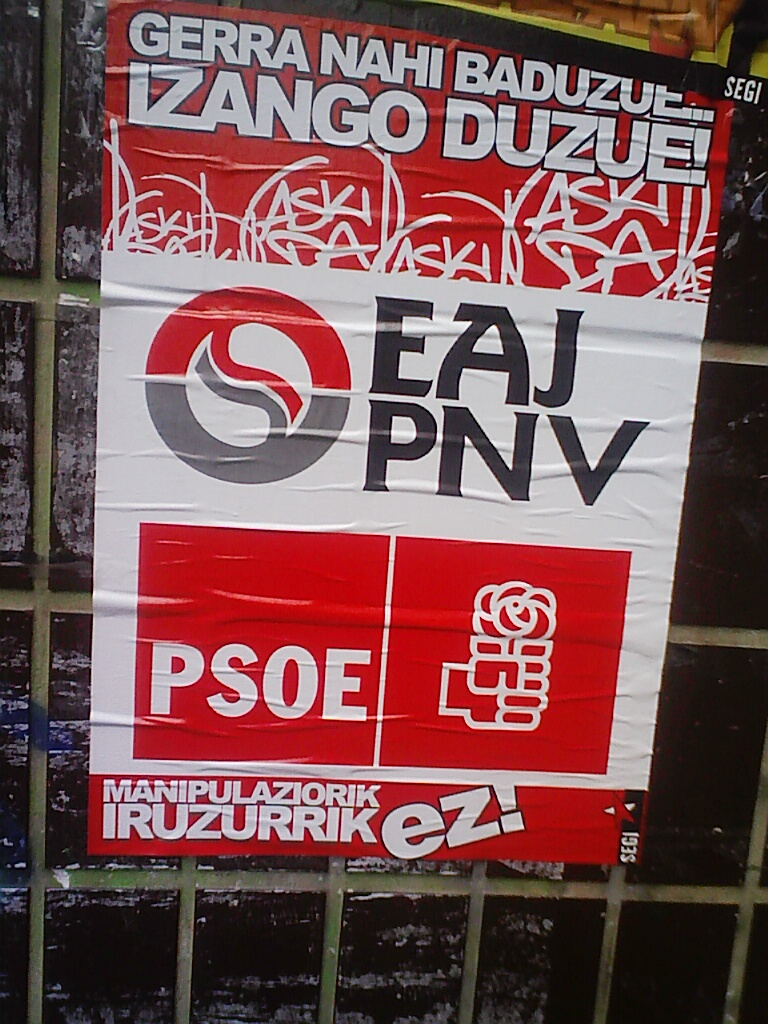 Cartel de Segi amenazando al PNV y PSE-EE poco antes de la ruptura de la tregua del 6 de junio de 2007; en la parte superior se advierte: "si queréis guerra la tendréis".